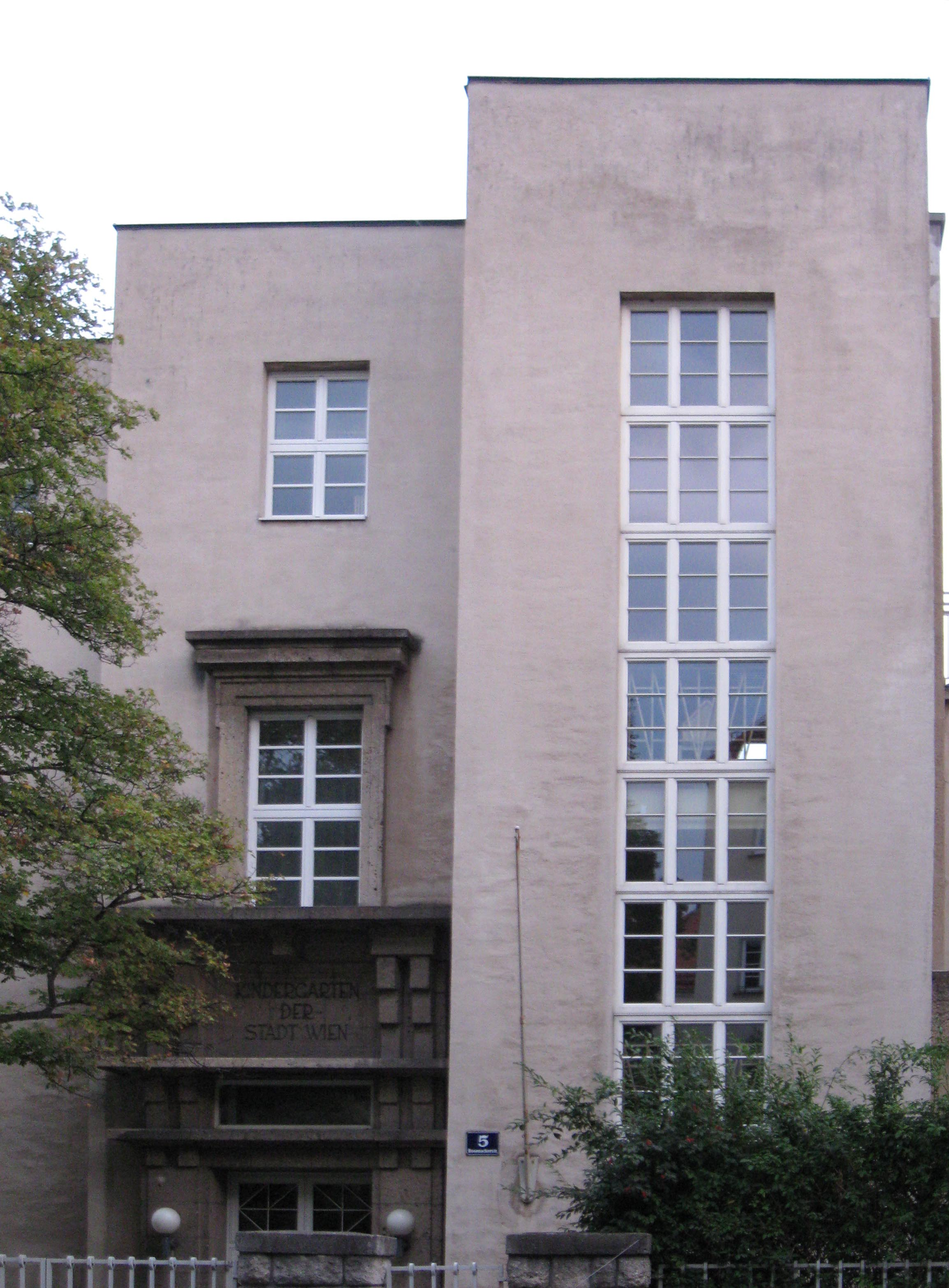 Wien Ottakring Rosenackerstraße 5 Sandleitenhof Kindergarten